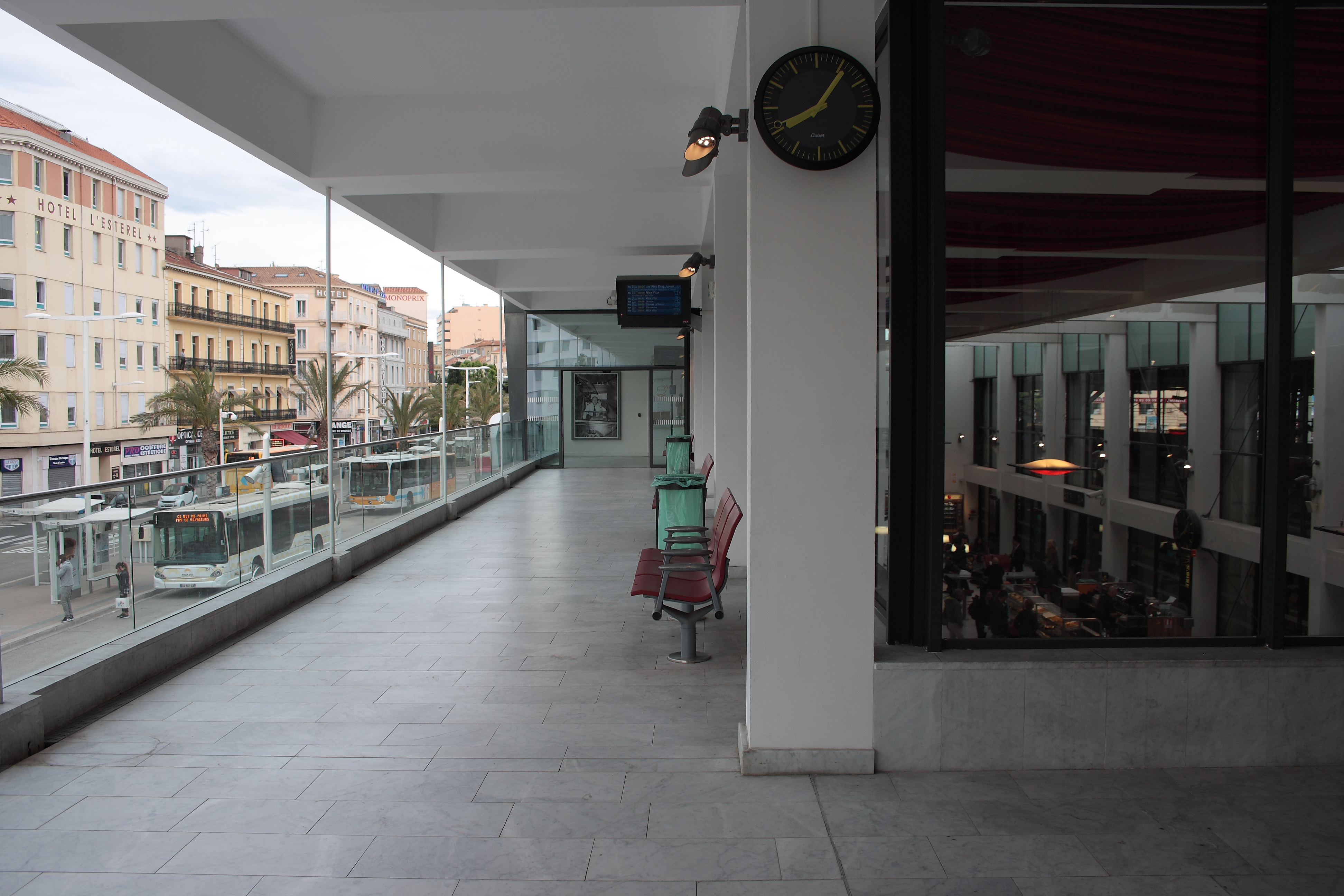 Cet espace d'attente, accessible par un escalier mécanique et un ascenseur, est situé au 1er étage de la gare.